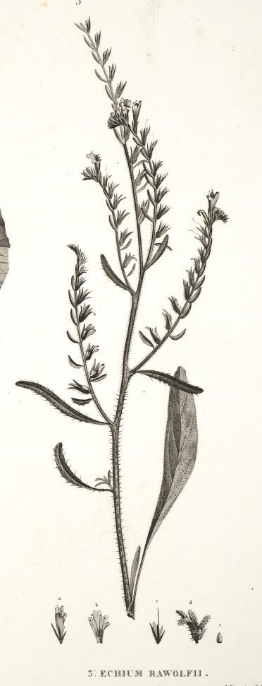 H.N. Botanique par M. Delile Pl. 191. Cordia myxa (+ fruit) 2. Cordia myxa ( + fleur) 3. Echium rawolfii (= Echium rauwolfii)